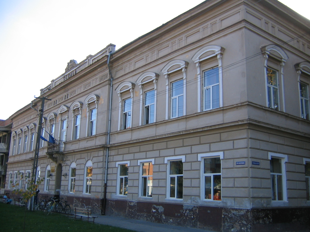 Liceul teoretic Nadlac